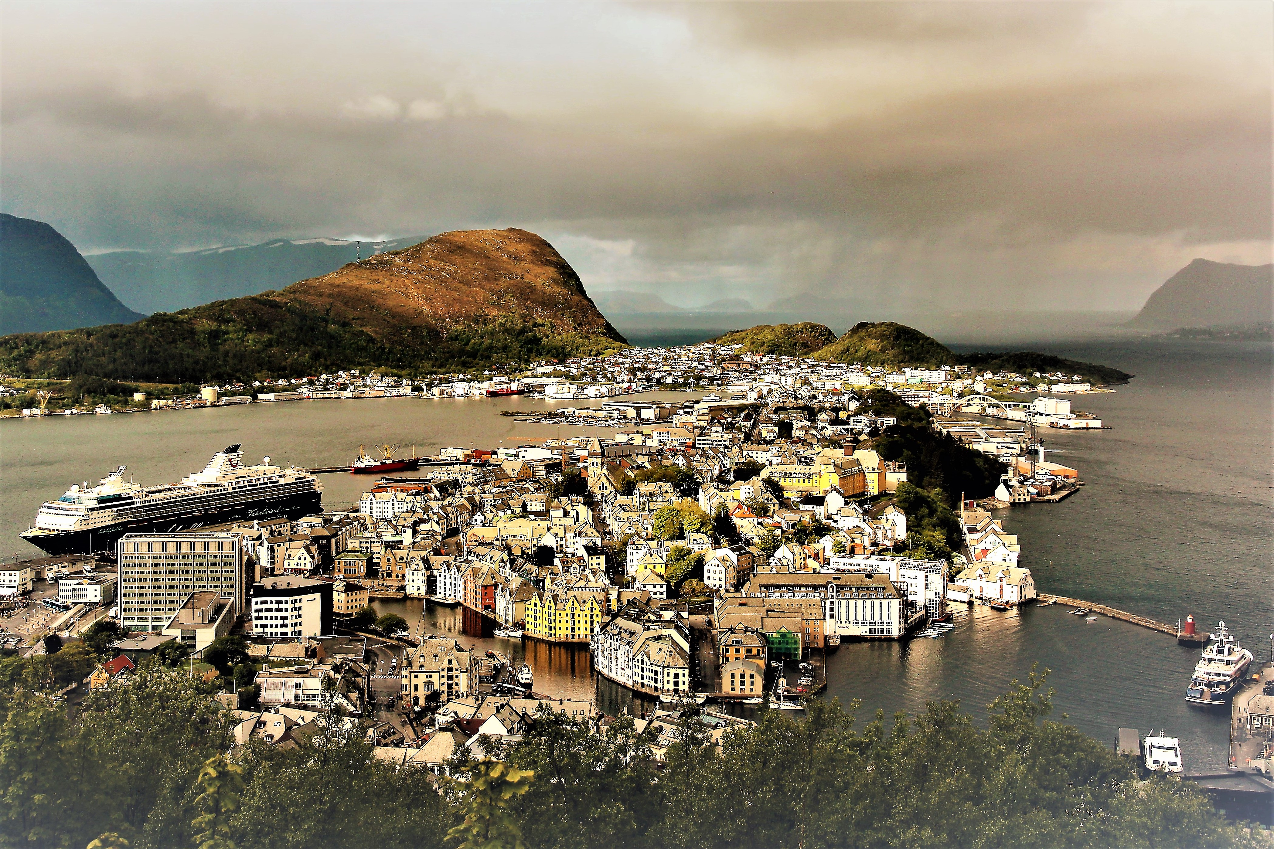 Alesund